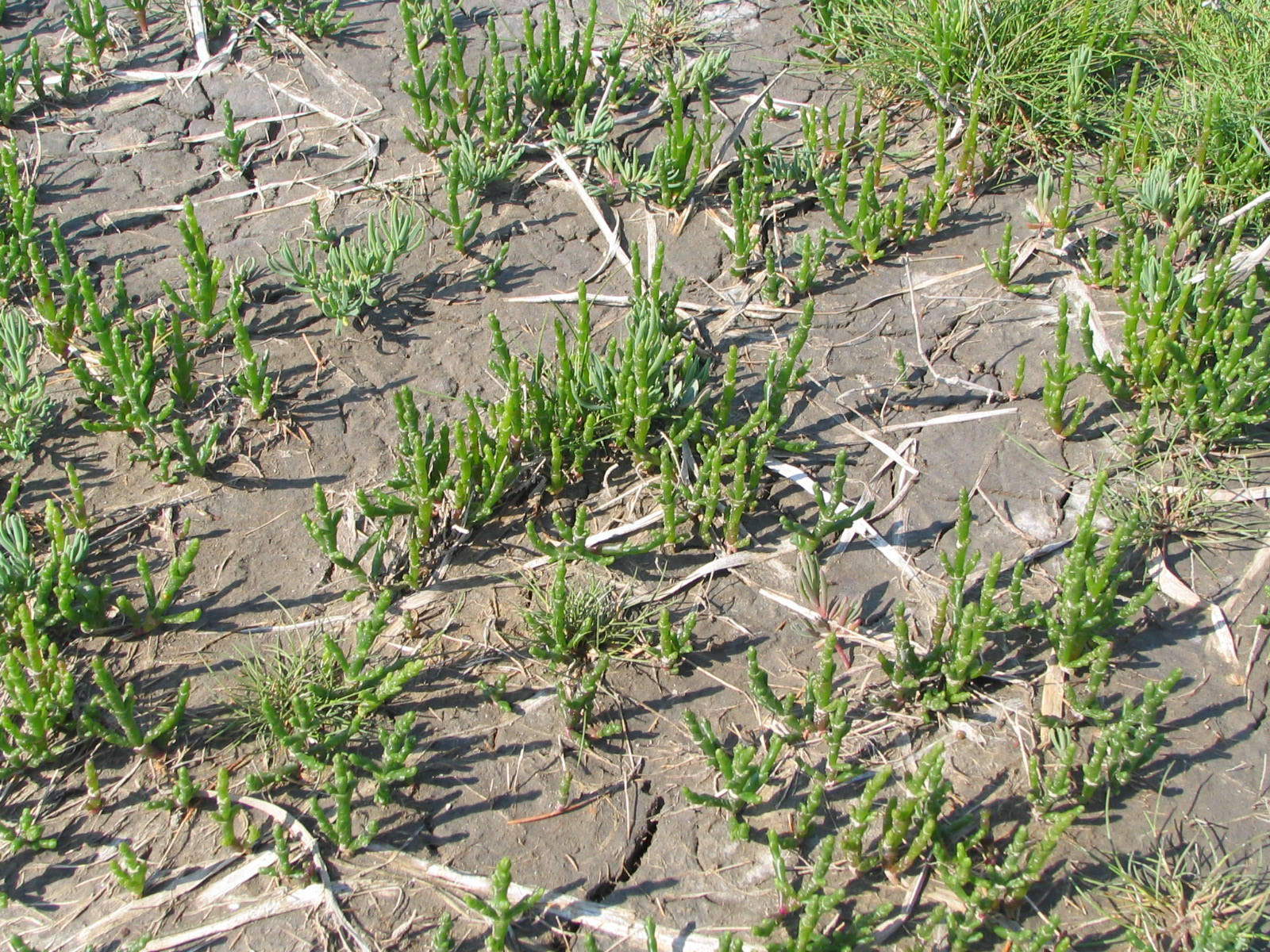 eigen foto. GerardM 21 jul 2004 08:18 (CEST)